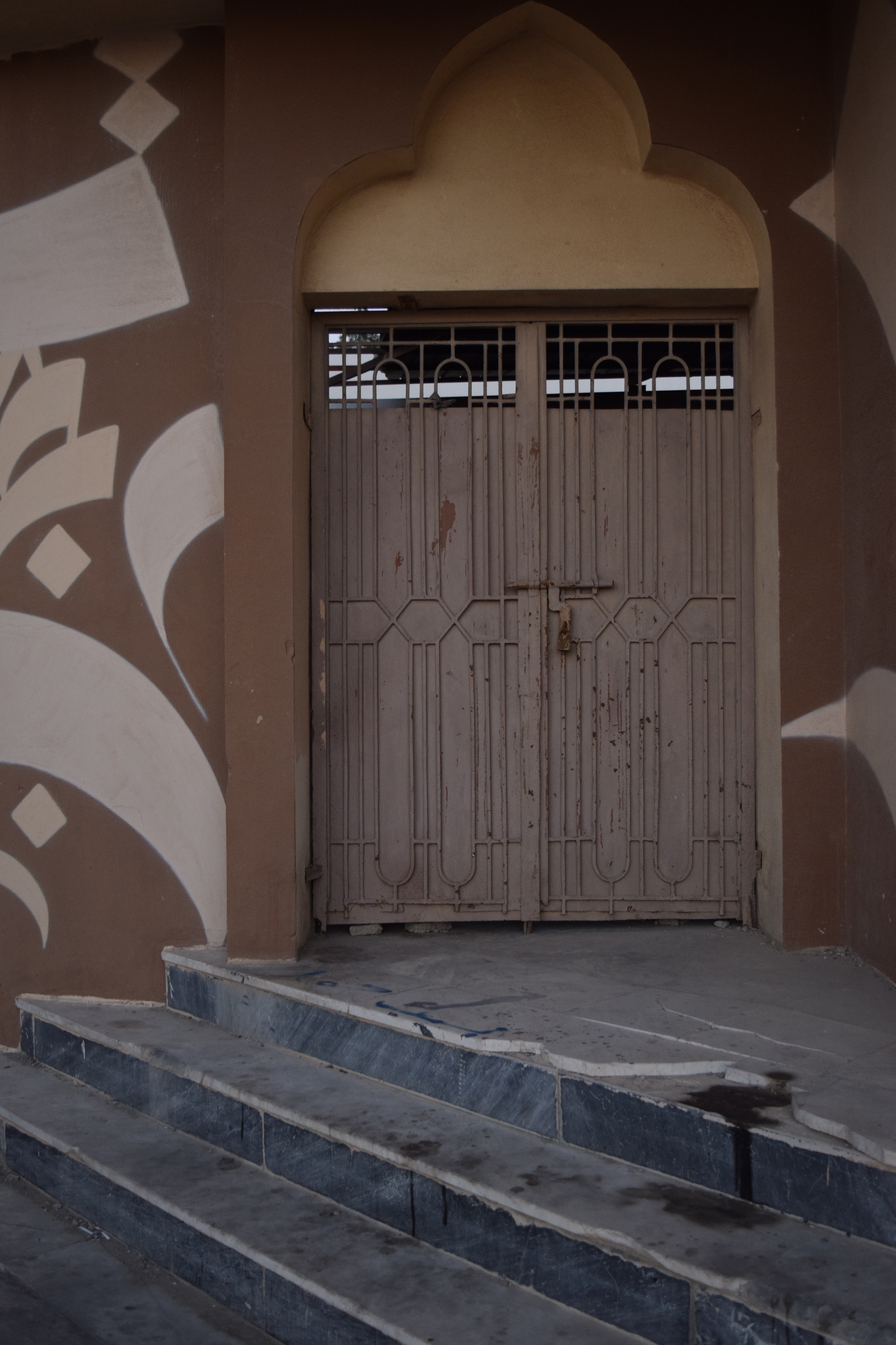 صورة توضح إغلاق الحمام